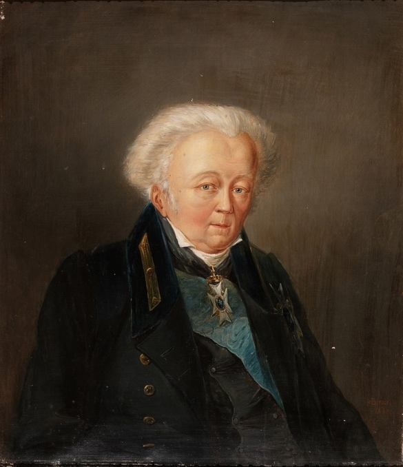 Porträtt av Germund Ludvig Cederhielm iklädd frack med guldknappar och sammetskrage, och bärandes Serafimerordens blåsa band. Runt halsen syns Nordstjärneorden. Målning från 1840 av Johan Christian Berger.